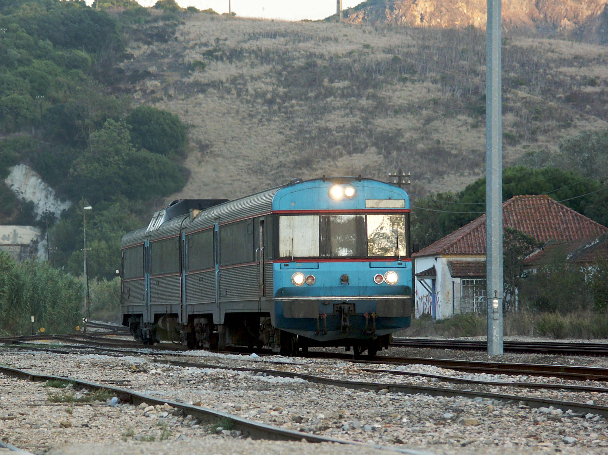 Tipo: Comboio Regional 6415 [Cacém - Caldas da Rainha] Local: Torres Vedras [Linha do Oeste, PK 63] Data e hora: 21 de Setembro de 2004 [19h04] Material: Automotora 04xx [Unidade Dupla Diesel]